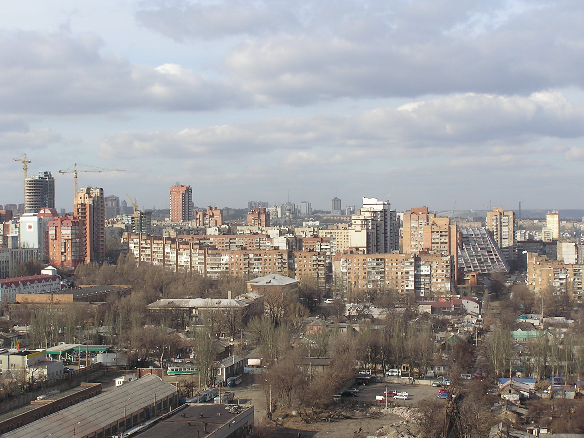 Донецк. Вид с террикона возле ДМЗ.